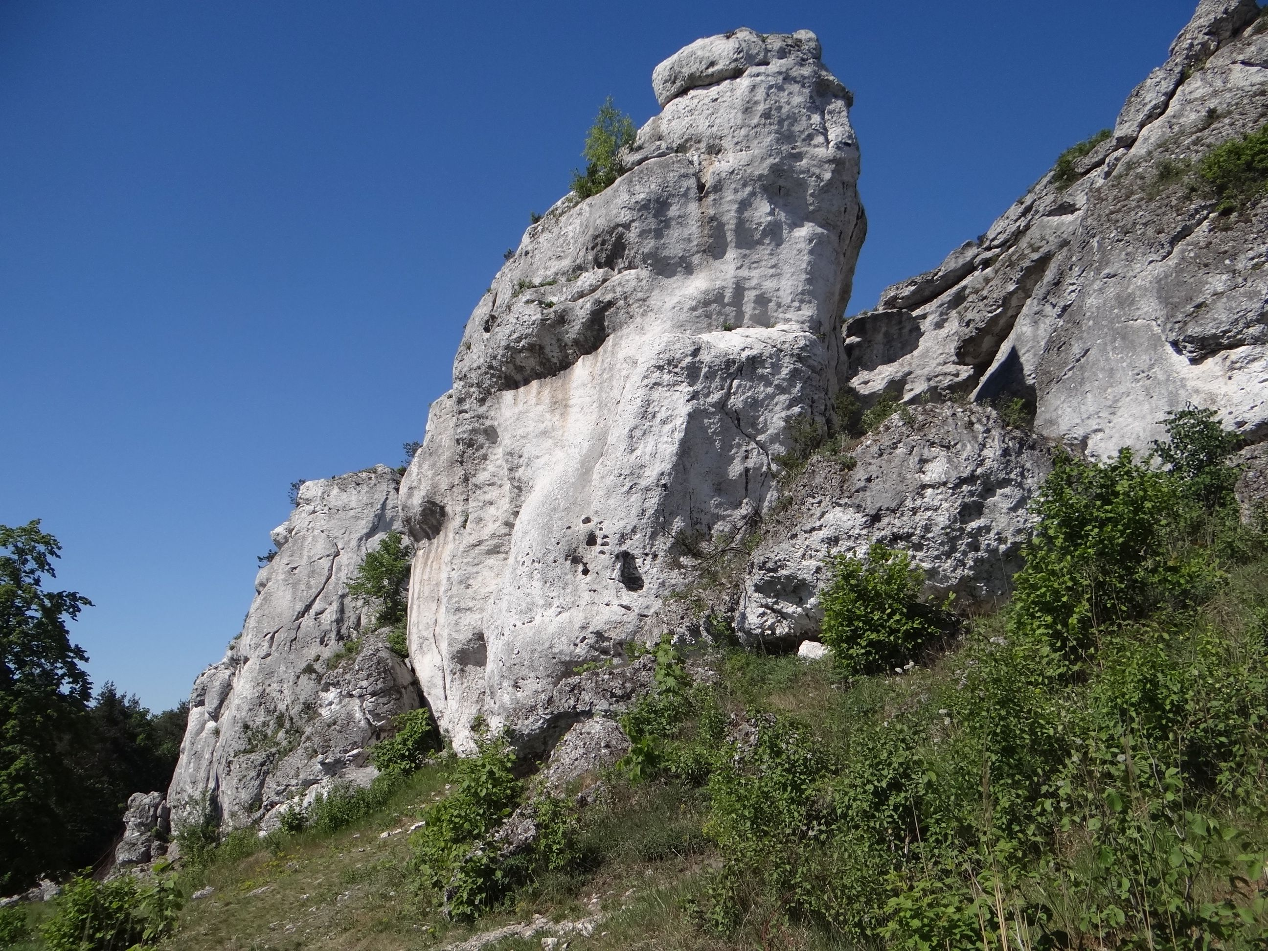 Turnia nad Kaskadą w rezerwacie przyrody Góra Zborów